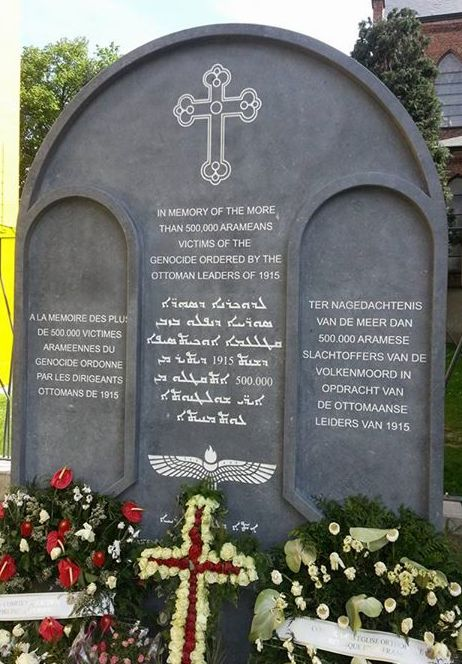 Denkmal für die Aramäer, die im Osmanischen Reich 1915 Opfer eines Völkermordes (aramäisch Sayfo) geworden sind. Errichtet in Brüssel (Belgien).